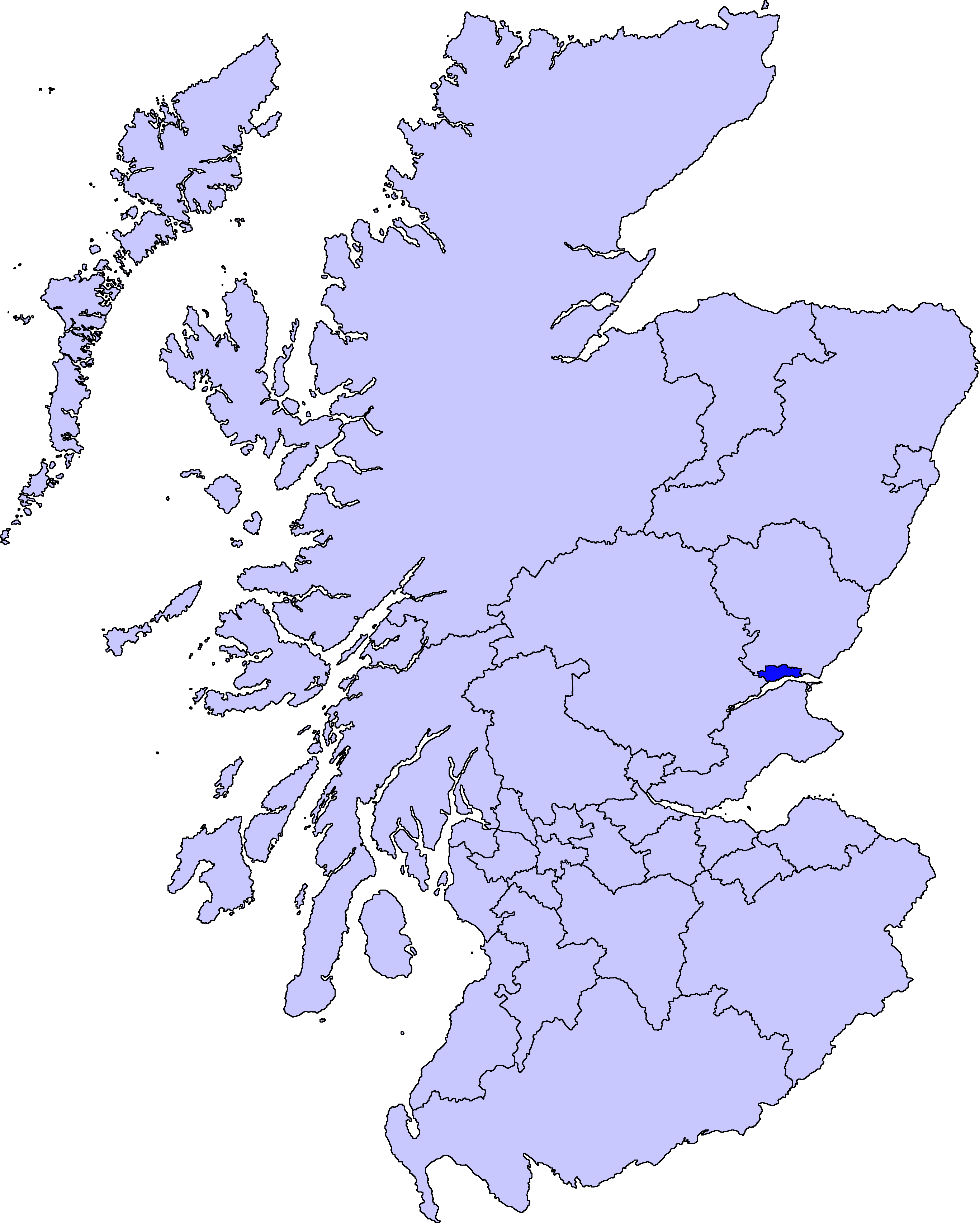 map of Dundee